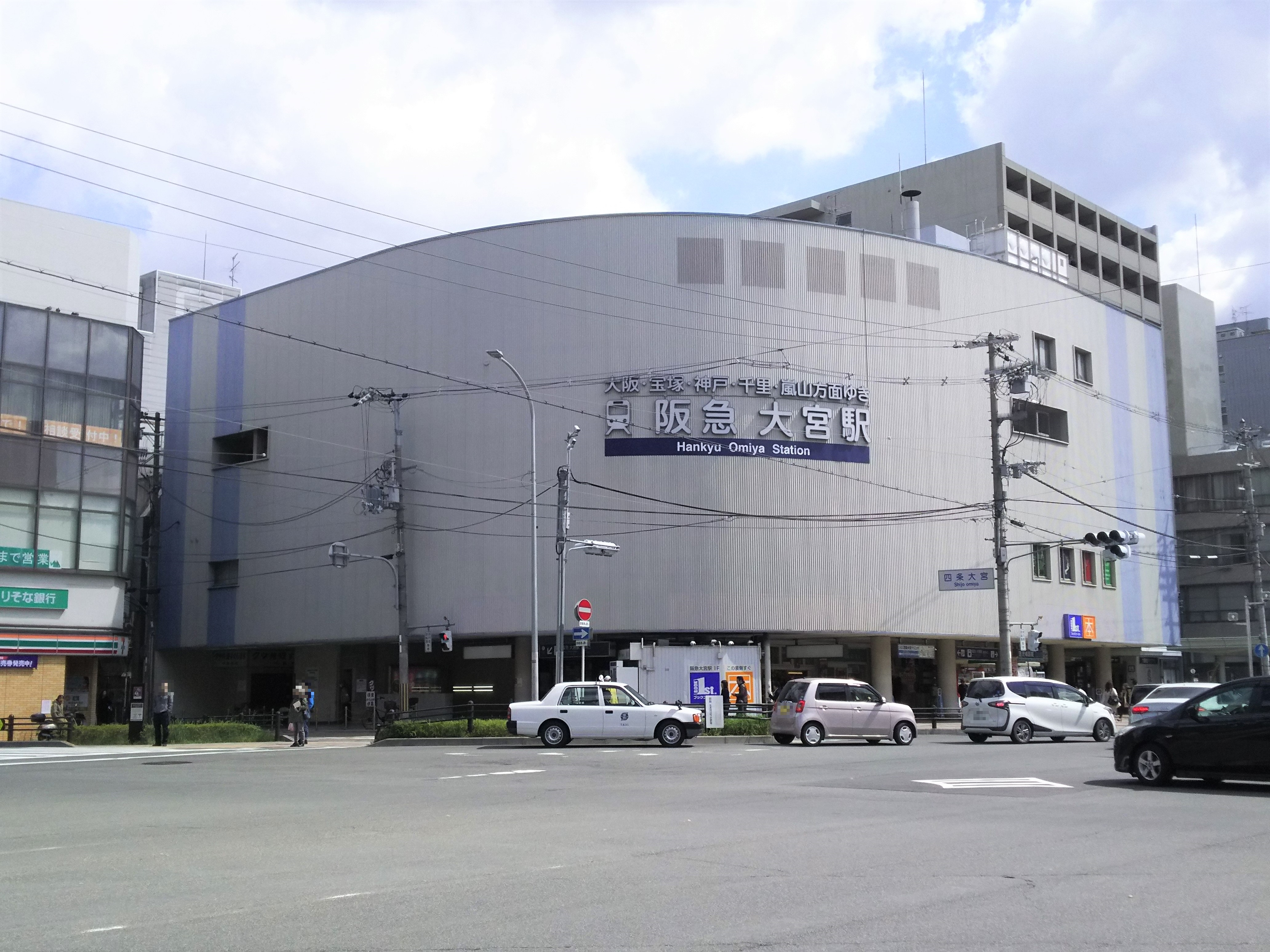 阪急京都線大宮駅（京都市中京区）